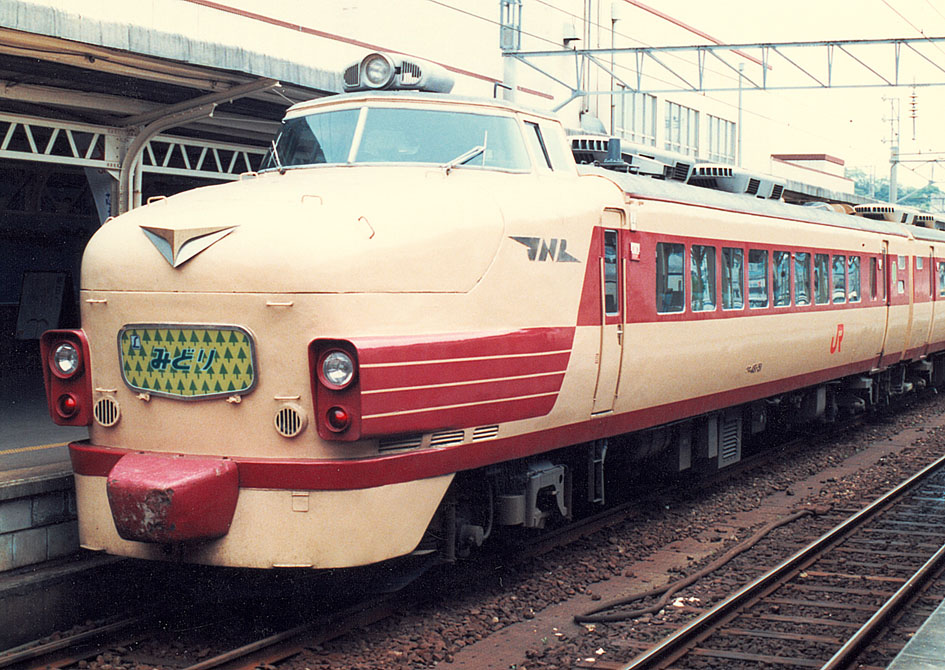 JR九州 クロ481-51